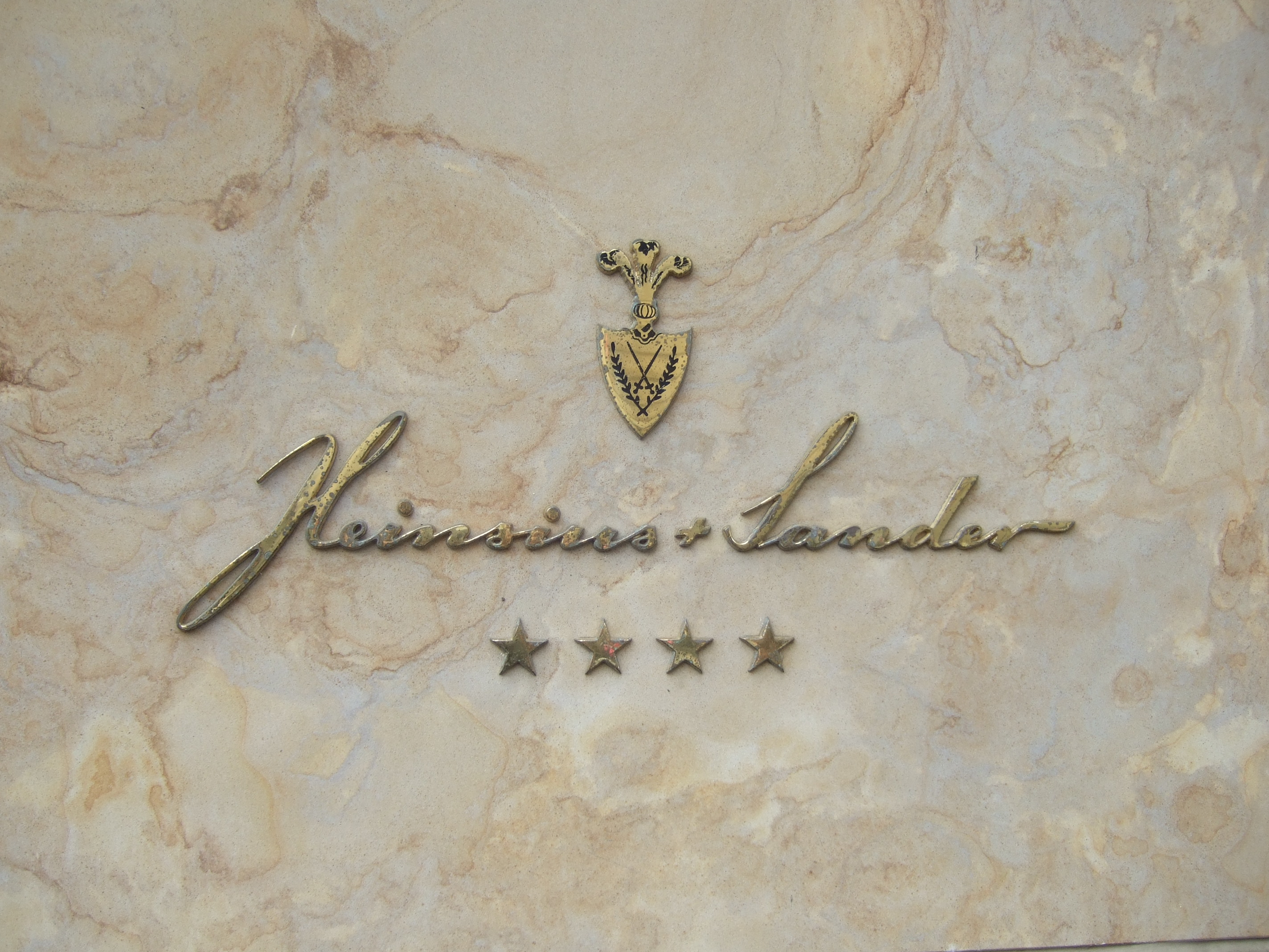 Emblem auf der Fassade des Geschäftshauses der ehemaligen Firma Heinsius + Sander